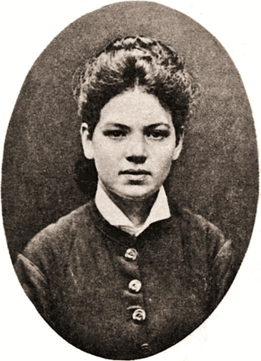 Gesja Meerovna Gel'fman